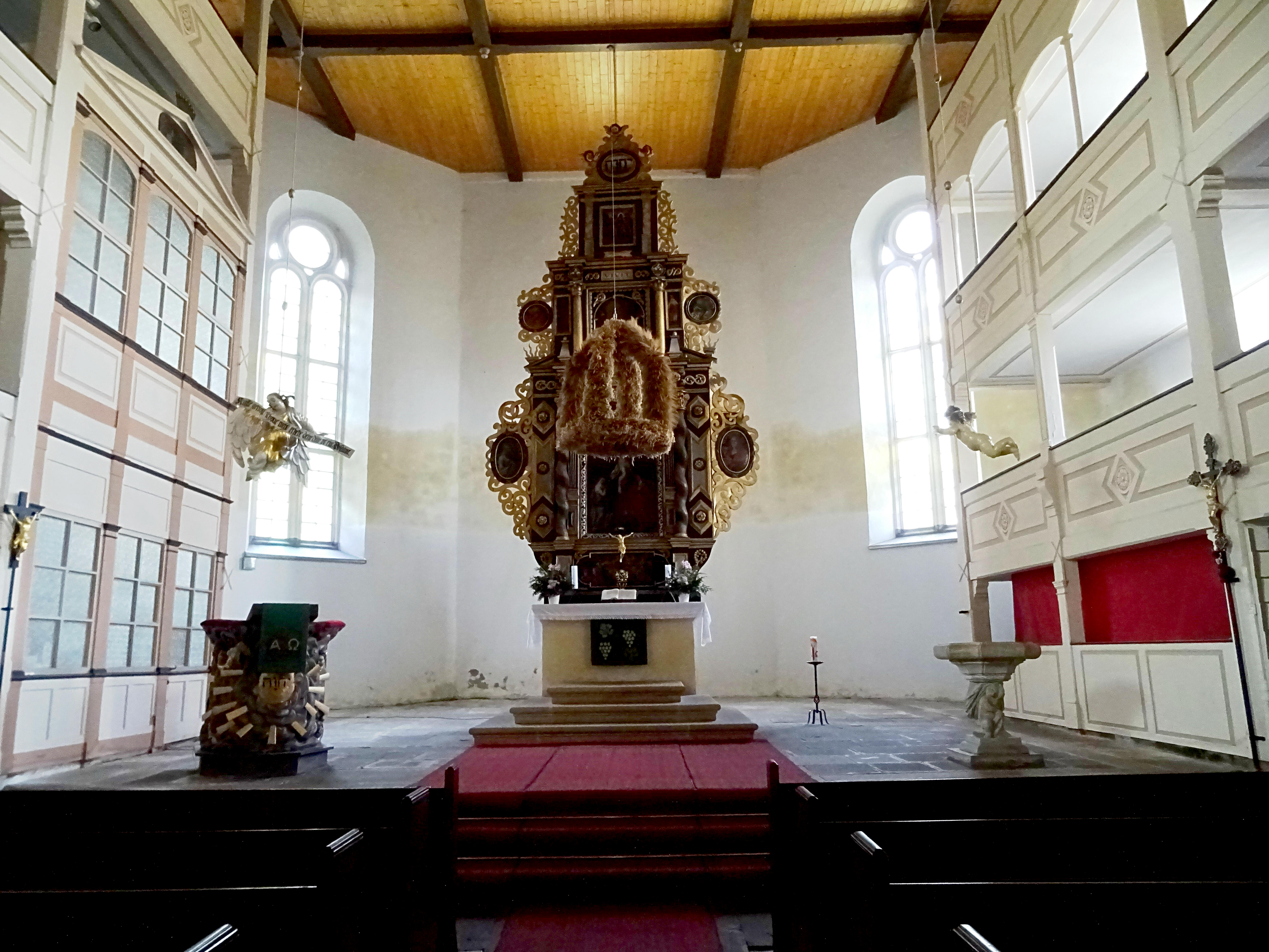 Geising: die evangelisch-lutherische Stadtkirche, Schon seit dem 15. Jahrhundert befindet sich am Ort der Geisinger Kirche eine Pfarrkirche. 1689 wurde sie als barocke, schlichte Hallenkirche mit dreistöckigen Emporen neu erbaut.